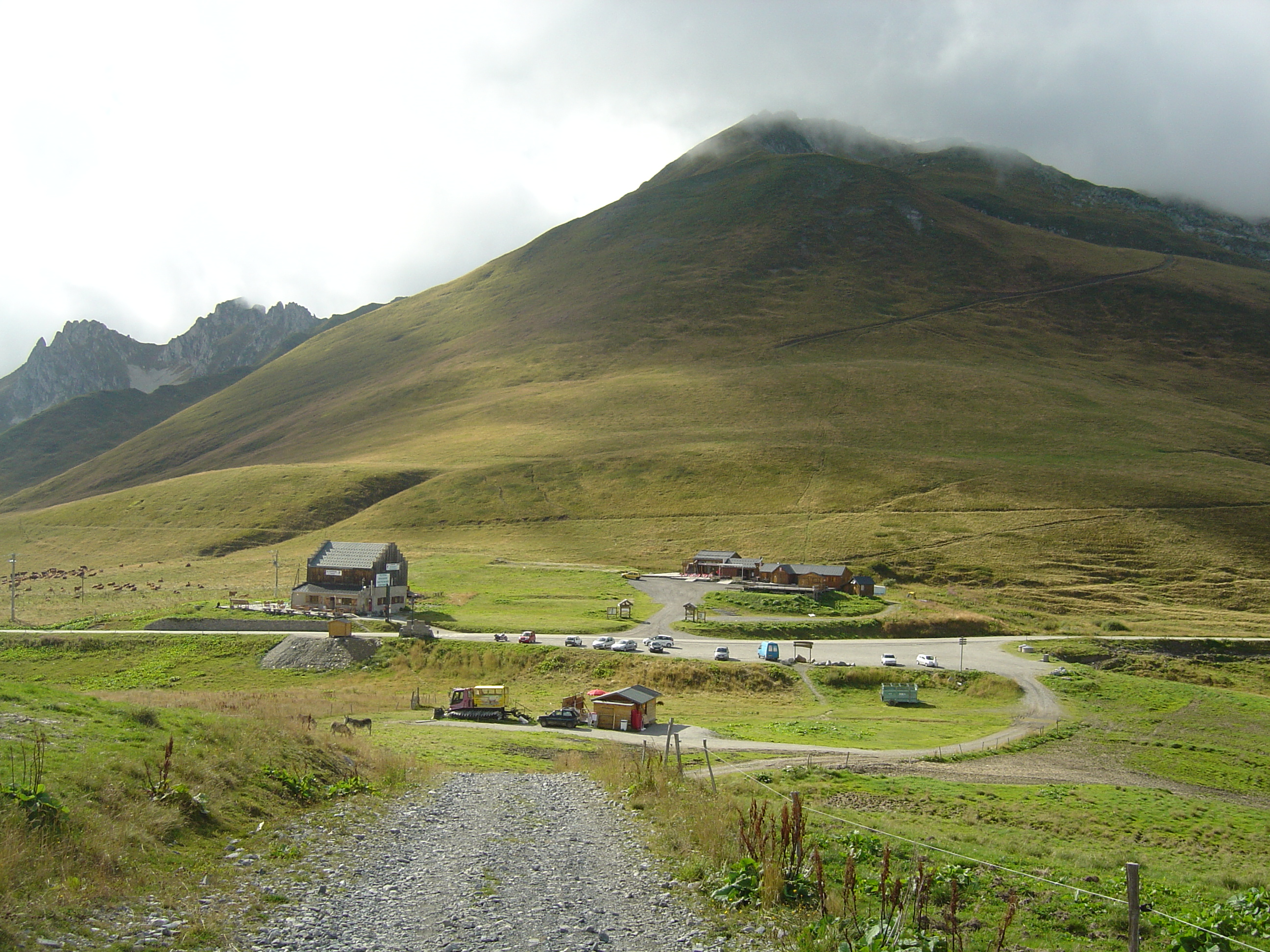 Vue générale du col de la Madeleine (1993m).